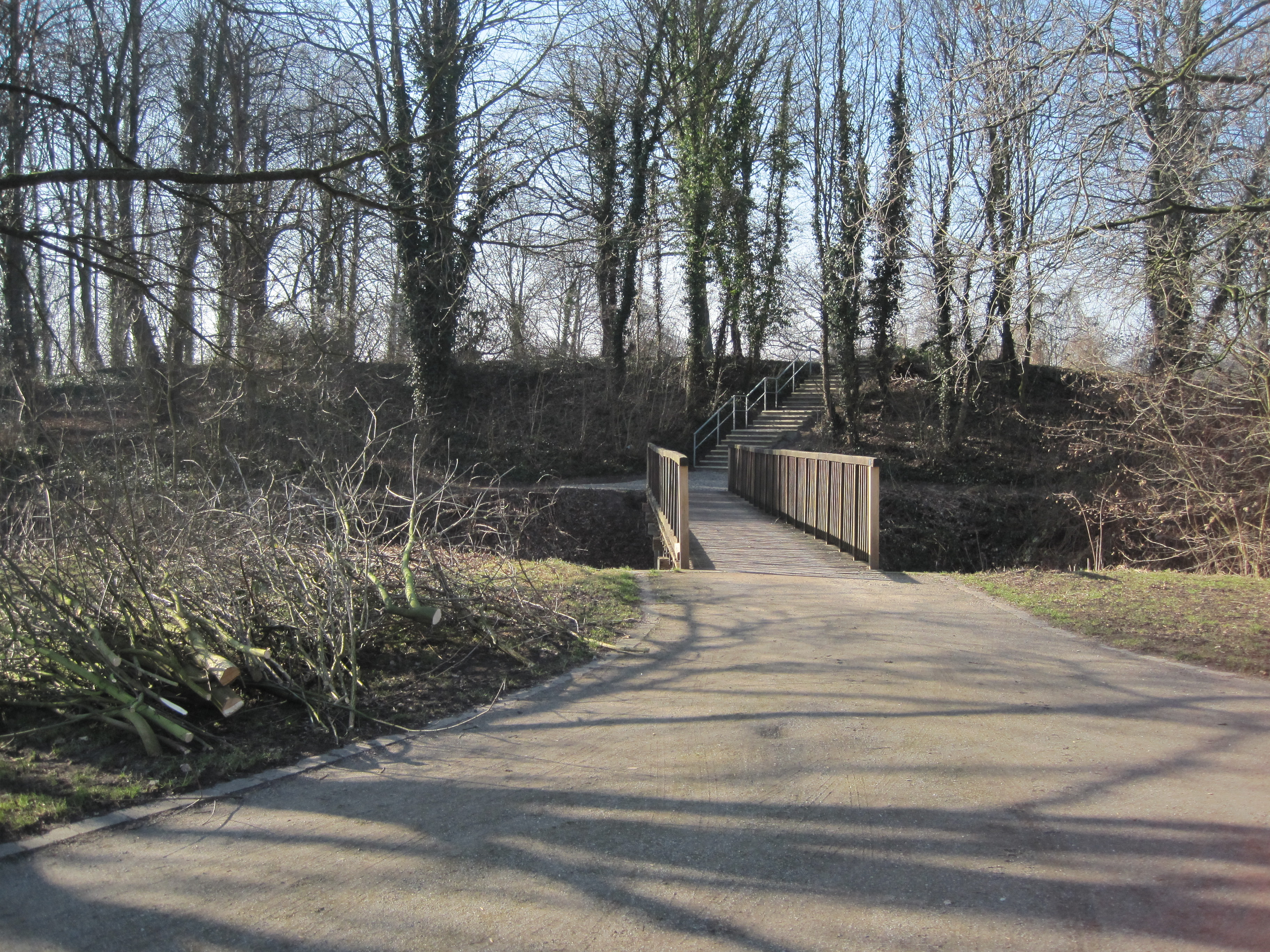 Das Foto zeigt den Aufgang zur Hauptburg auf dem Burghügel zur Mark in Hamm.